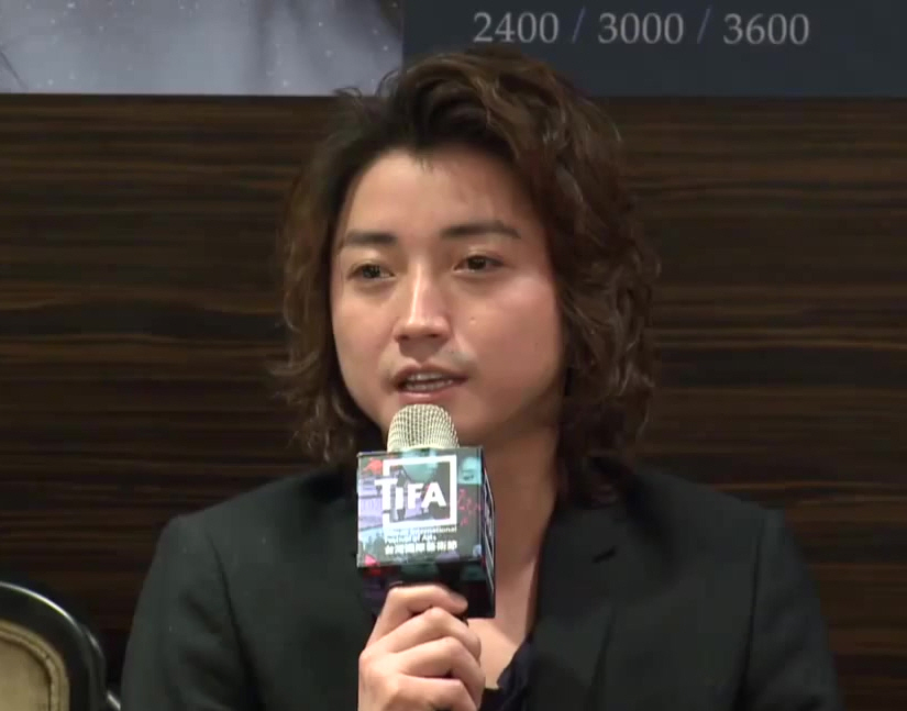 2015台灣國際藝術節，藤原龍也出席蜷川幸雄導演作品《哈姆雷特》宣傳記者會。